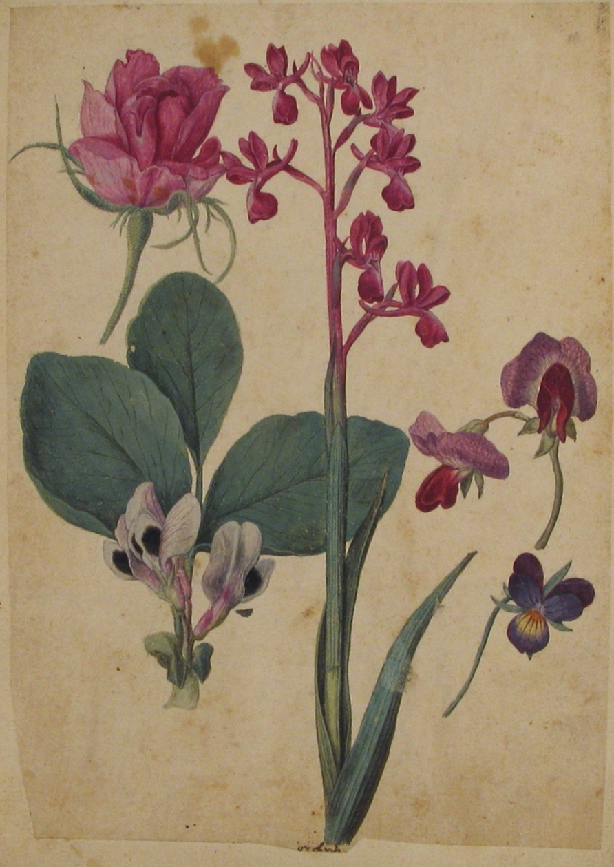 Drawing; Drawings